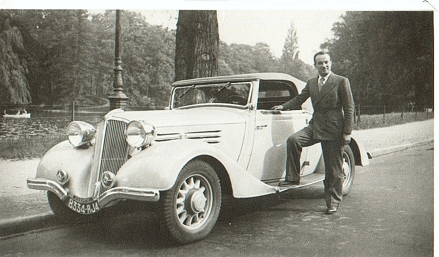 Photo prise aux bois de Boulogne -1934